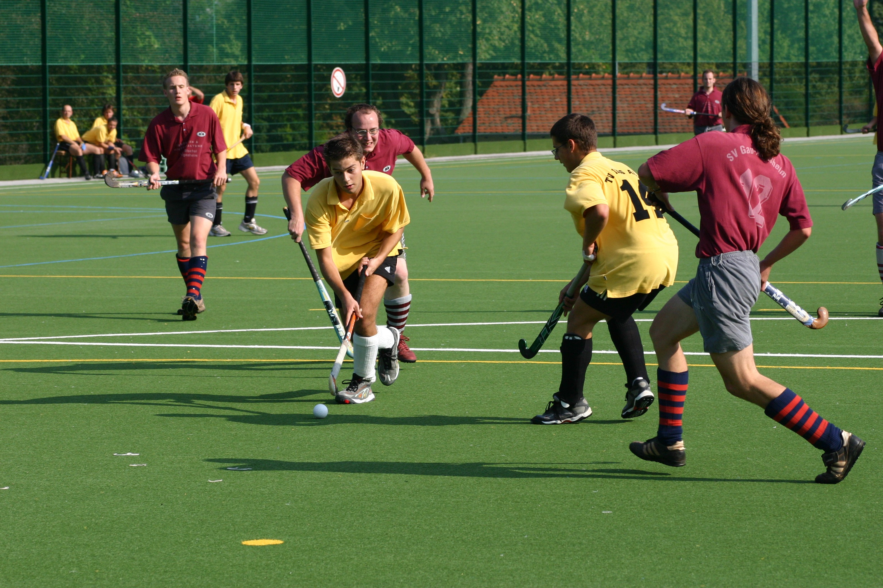 Szene aus einem Feldhockeyspiel in Deutschland